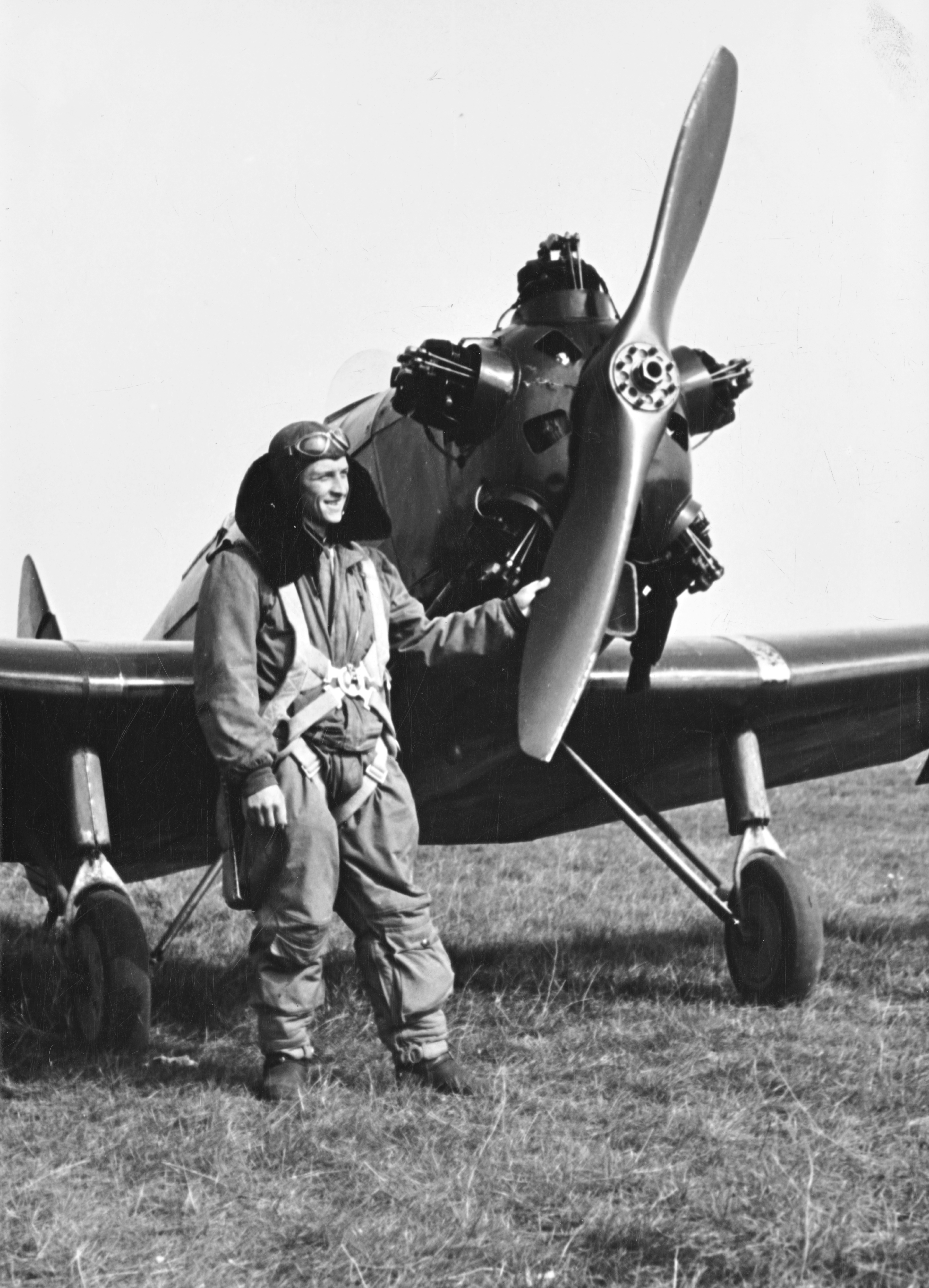 Hungary ? Tags: pilot, airplane, Soviet brand, Yakovlev-brand